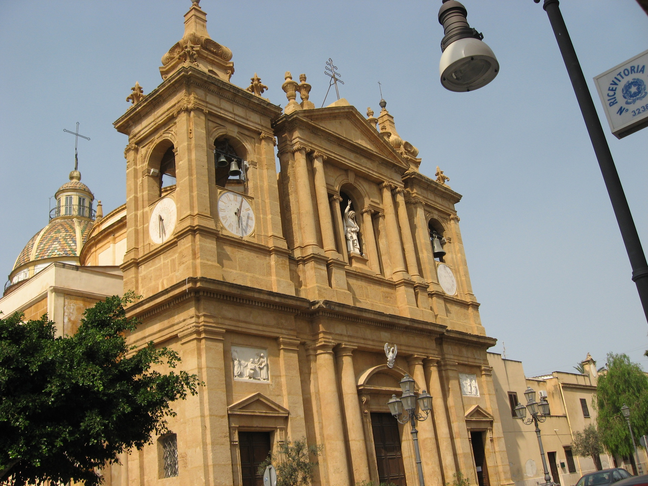 Commune di Santa-Flavia